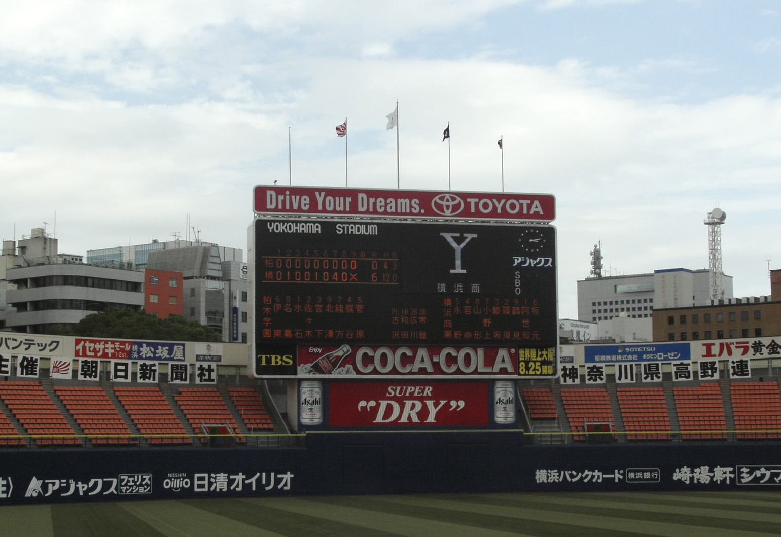 Yokohama Stadium